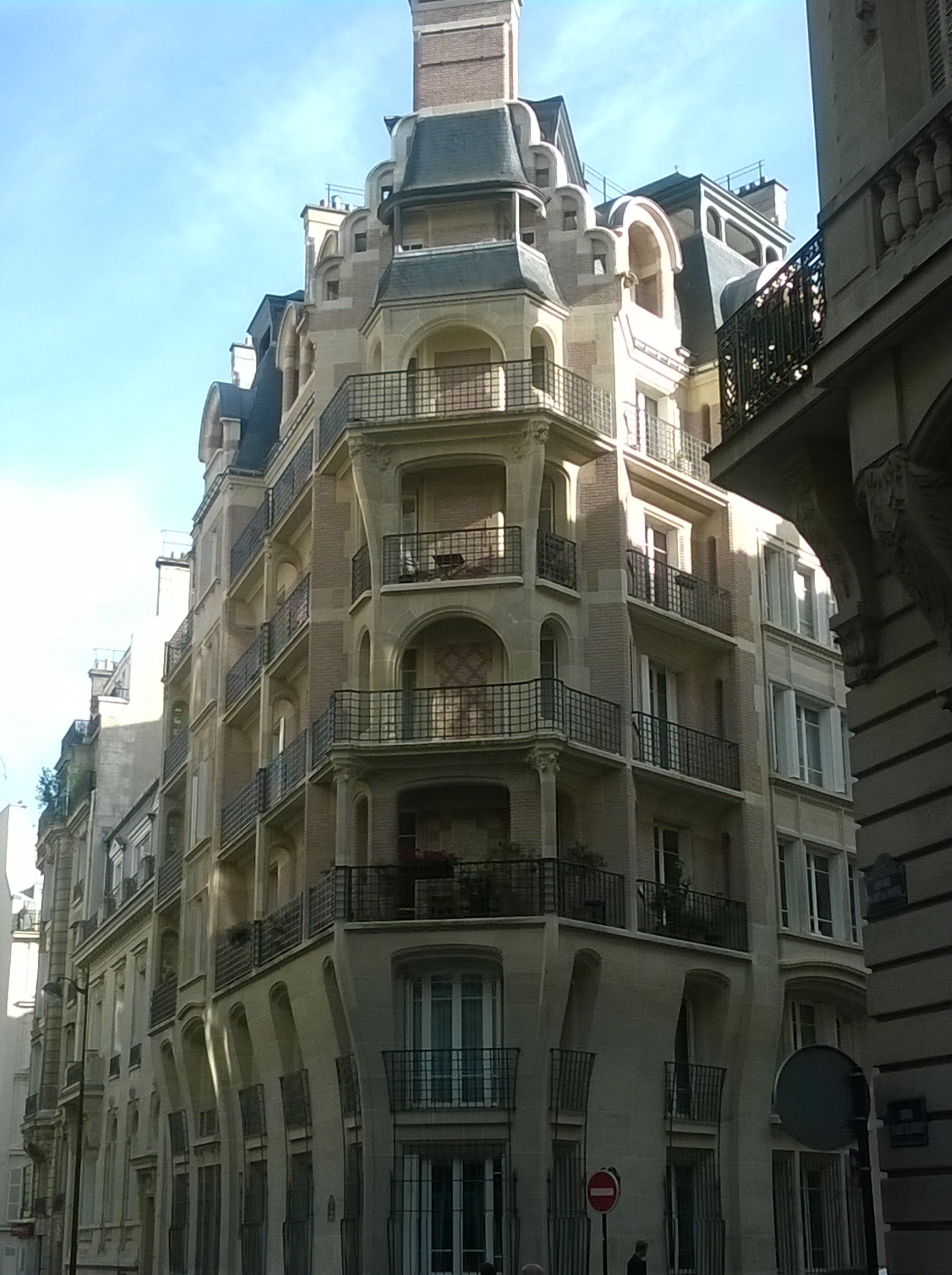 rue Villaret-de-Joyeuse, immeuble environ 1900; avec 2 façades sur la rue environ 1900